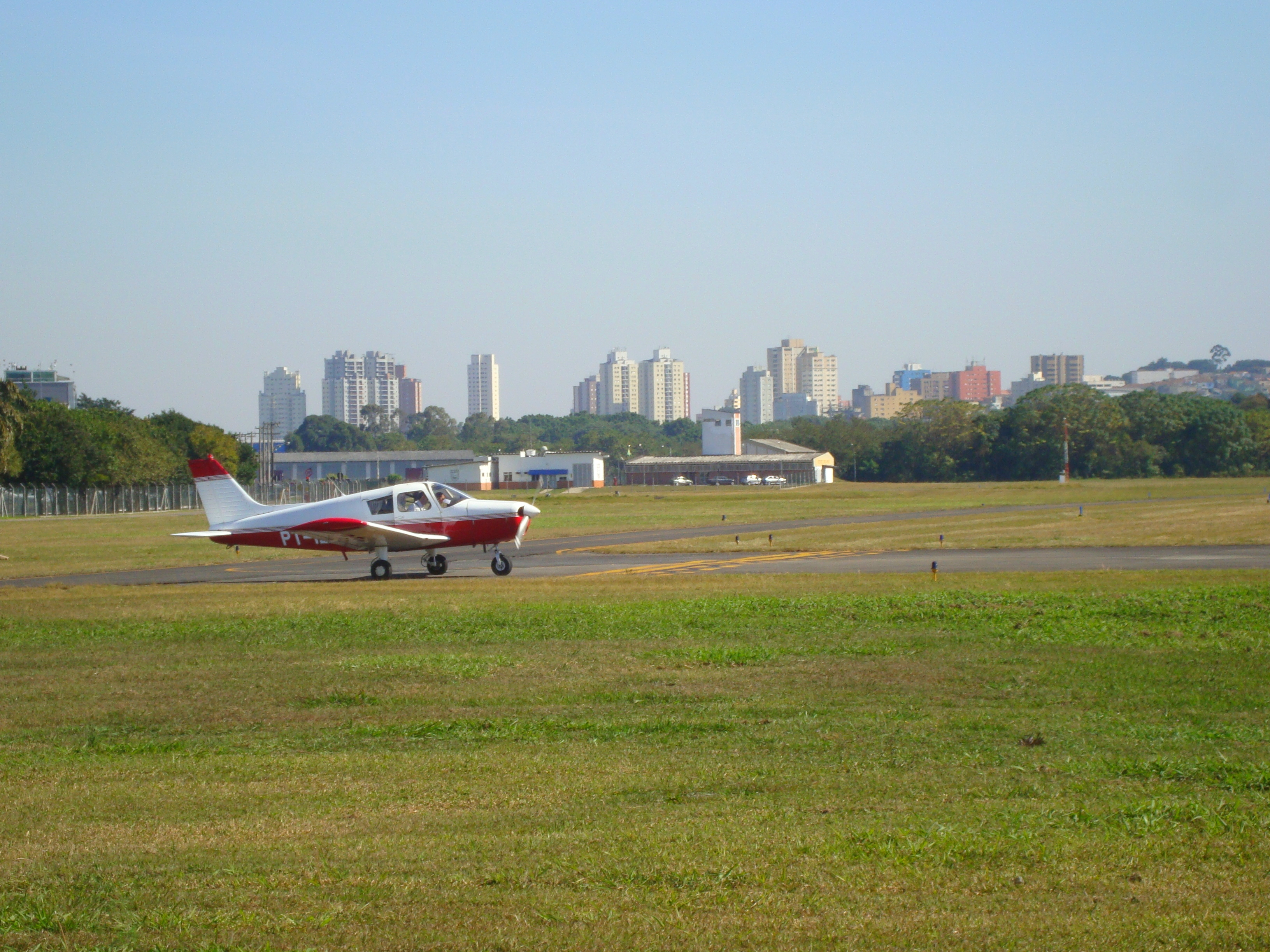 Avião que se prepara para decolar no Aeroporto Campo de Marte, distrito de Santana Zona Norte paulistana. Ao fundo o distrito da Casa Verde.